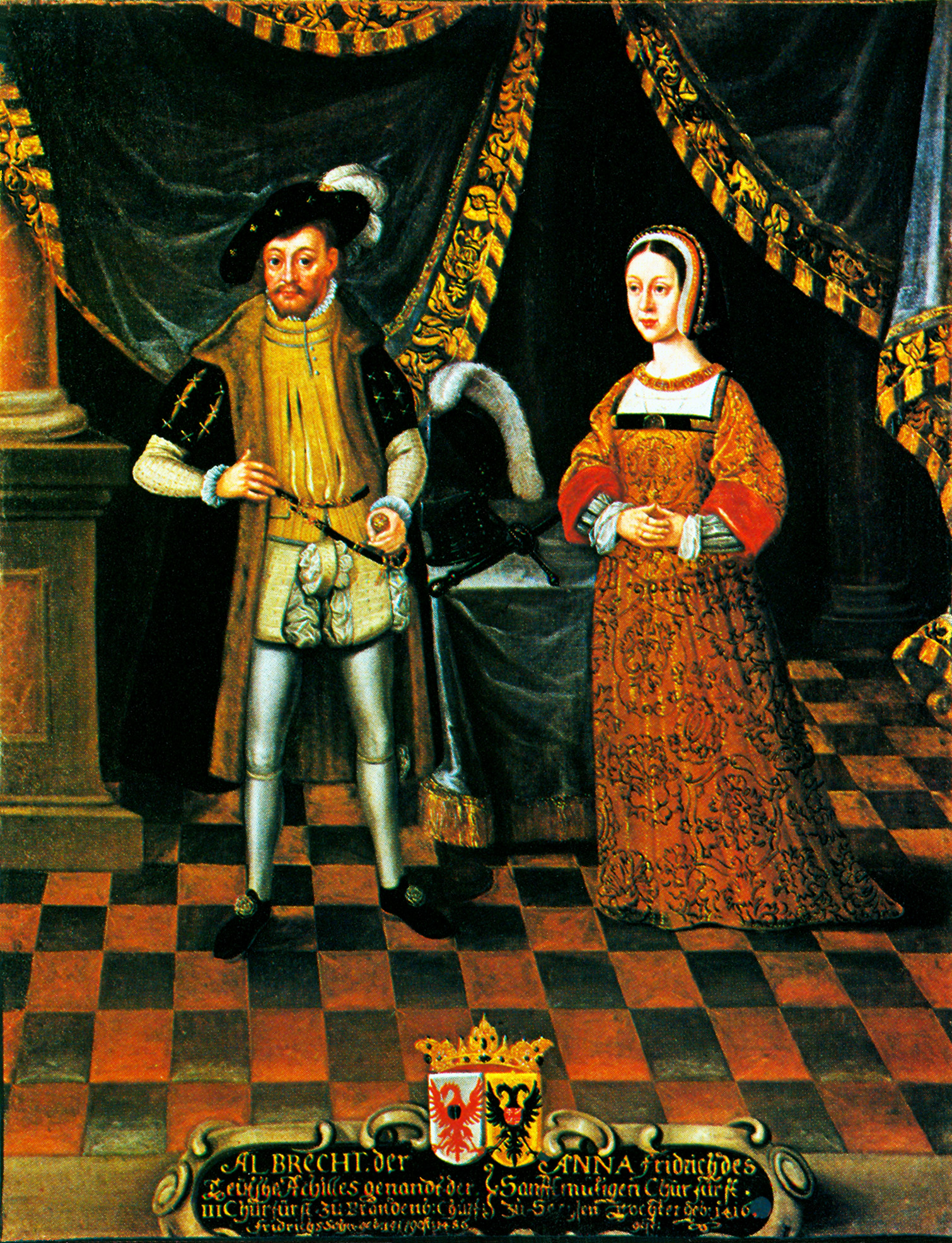 Albrecht Achilles, Kurfürst von Brandenburg (1455-1499), und seine zweite Gemahlin Anna, Prinzessin von Sachsen (1436-1512). Stockholm, Nationalmuseum, Sammlung Gripsholm.